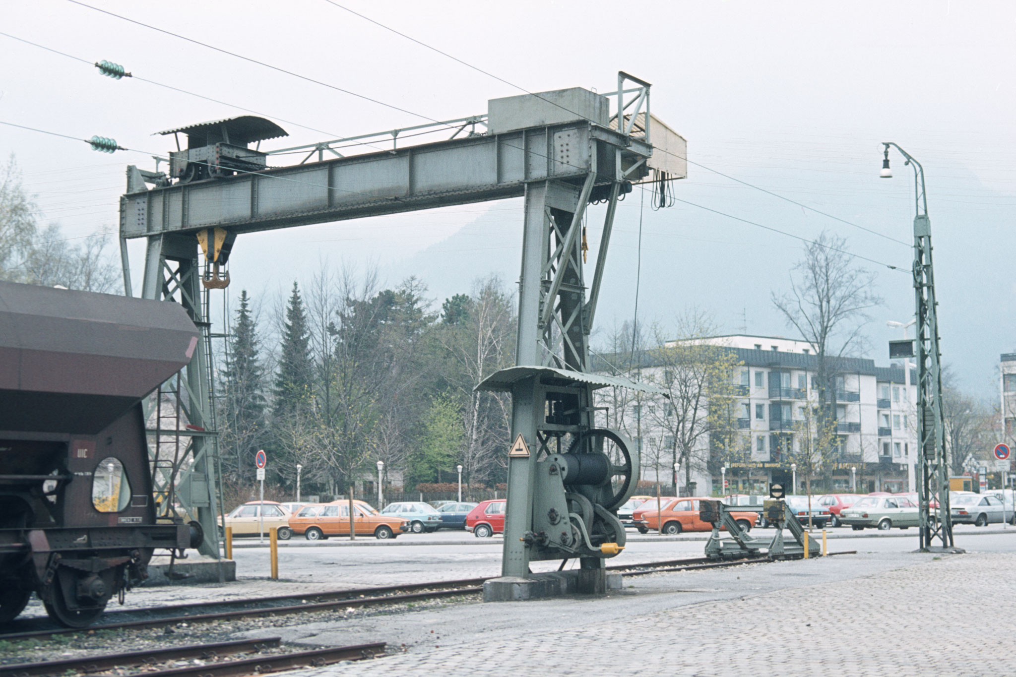 Ein Bild aus der Zeit, als noch Wagenladungs- und Stückgutverkehr auf der Schiene gab. Im Bahnhof Bad Reichenhall stand an den Ladegleisen ein Überladekran. Der Bahnhof ist heute auf zwei Bahnsteiggleise zurückgebaut, auf dem Areal, das einst dem Güterverkehr diente, finden sich heute einige Lebensmitteldiscounter.